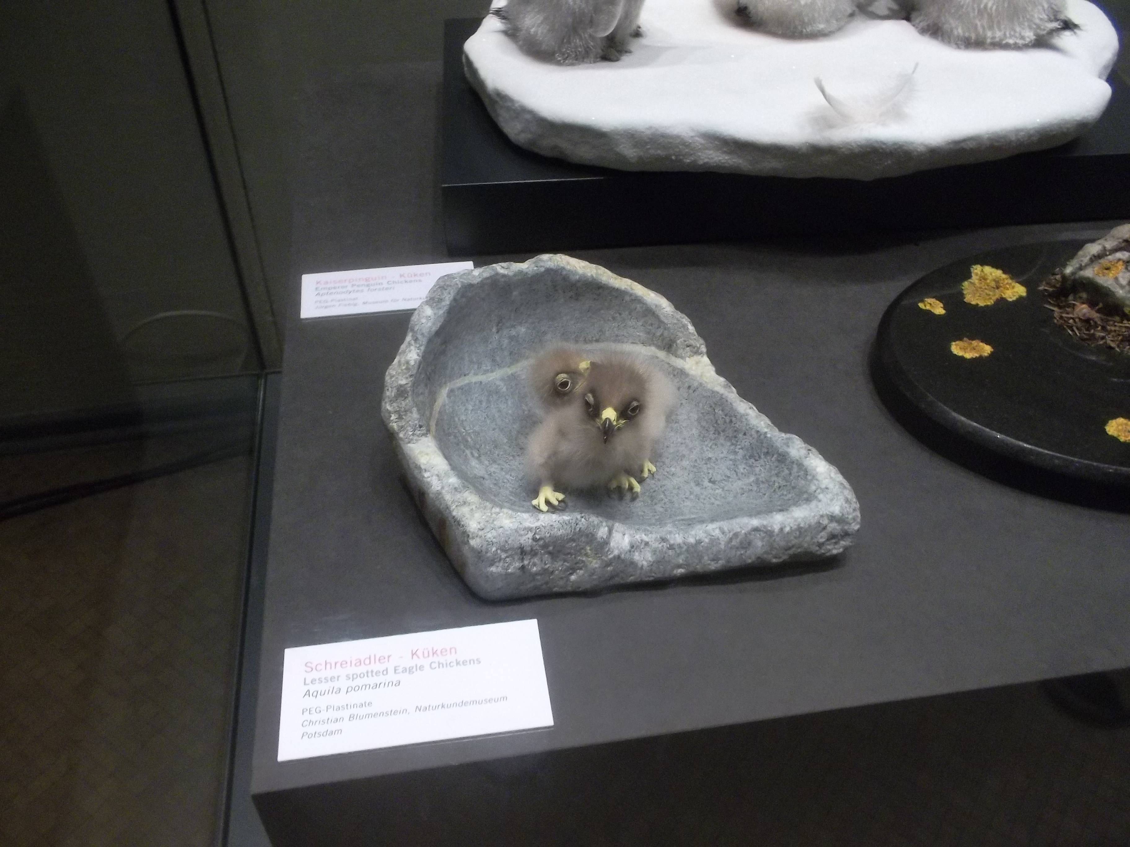 2 präparierte Küken des Schreiadlers (Aquila pomarina) im Museum für Naturkunde, Berlin